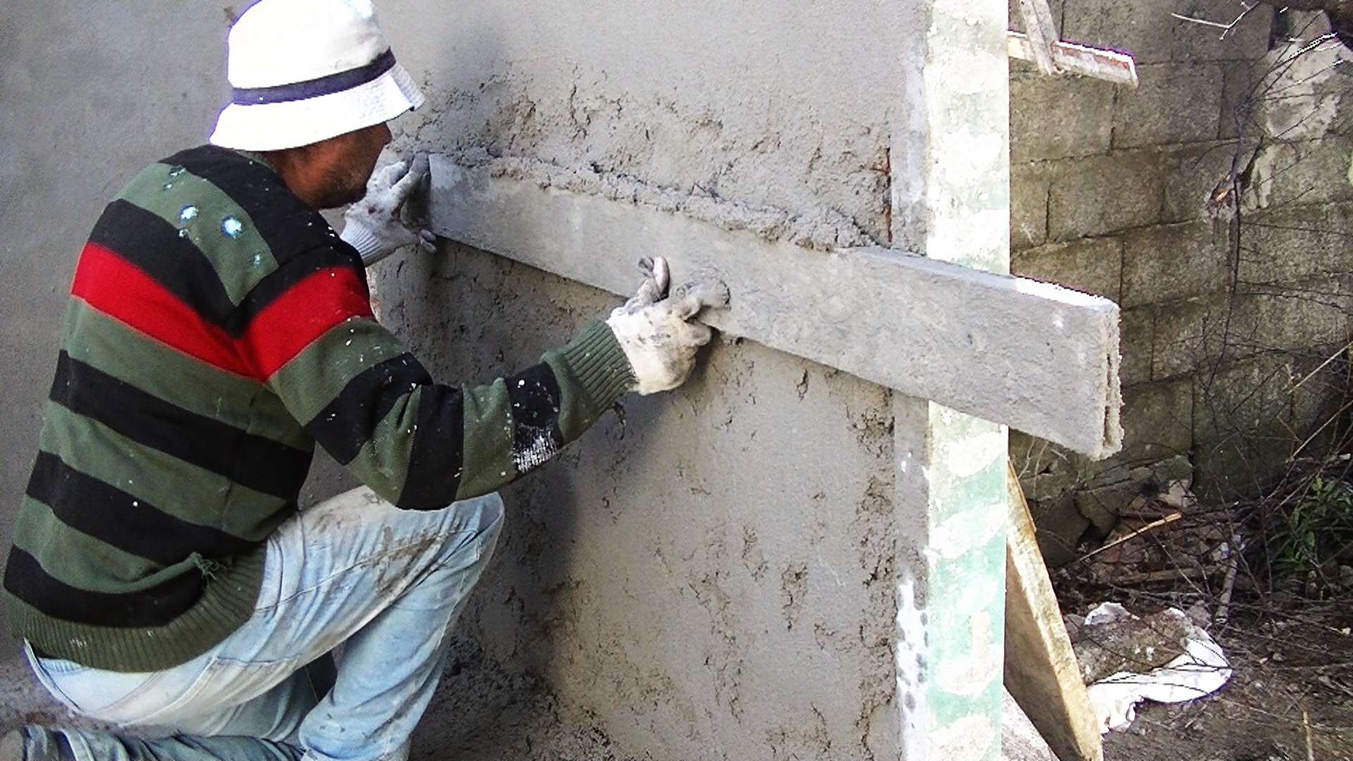 Ejemplo de uso de dos regles para alizar una pared.